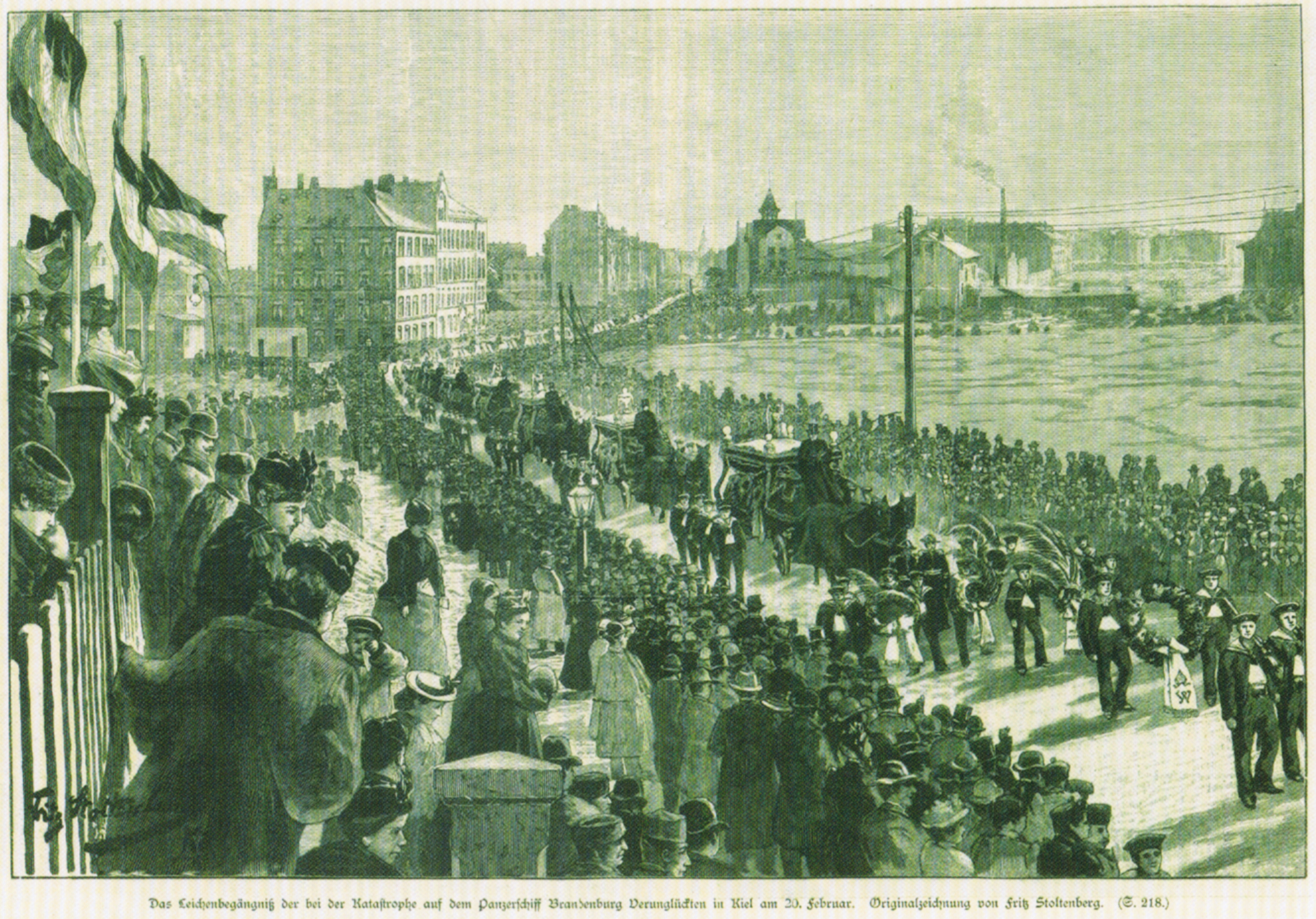 Der Beerdigungszug der Opfer des Unglücks auf dem Panzerschiffs Brandenburg durch Kiel am 20. Februar 1894, Holzstich und Zeitschiftenillustration von Fritz Stoltenberg